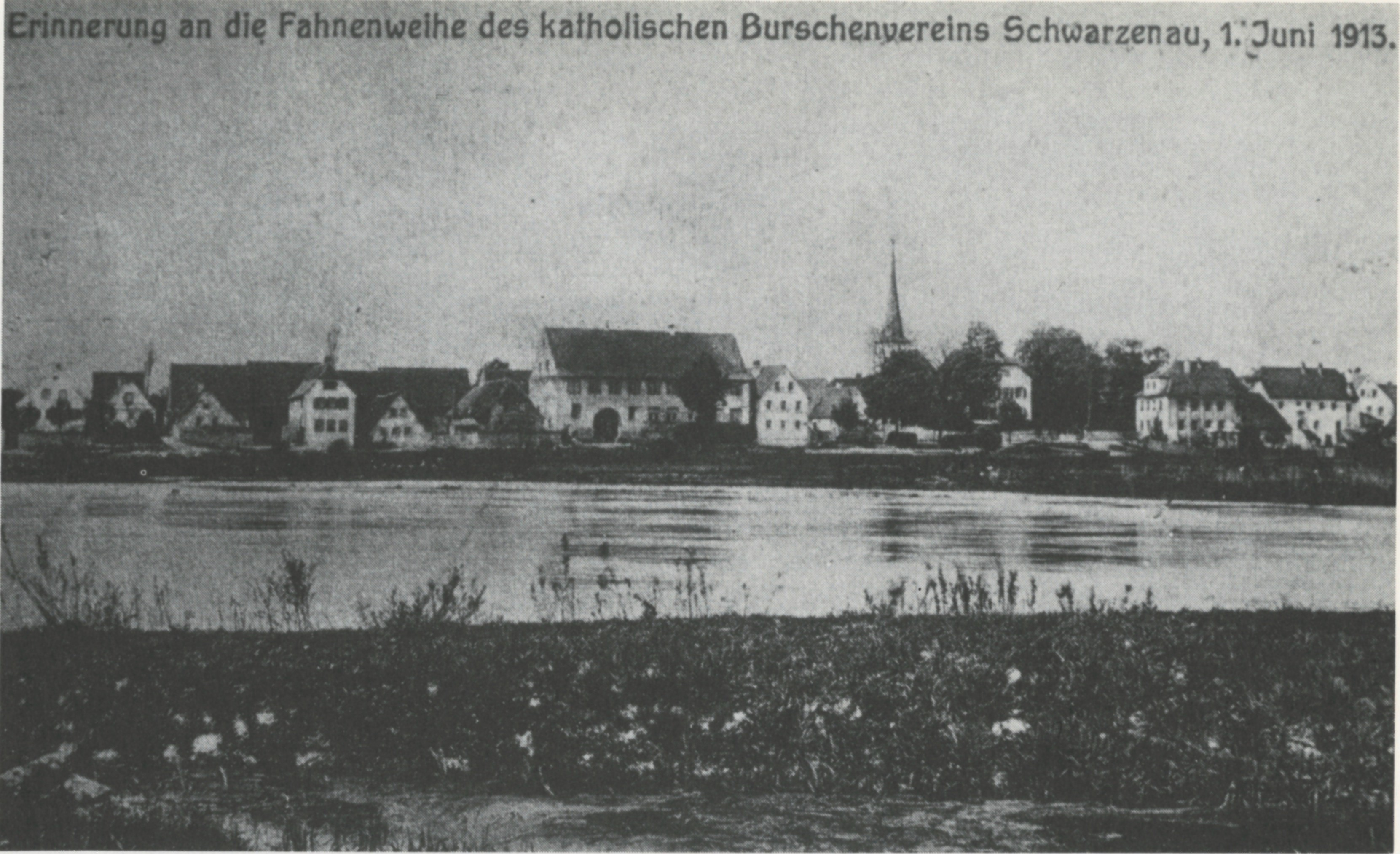 Schwarzach am Main-Schwarzenau, auf der anderen Seite des Maines. Mit Schloss und Kirche.